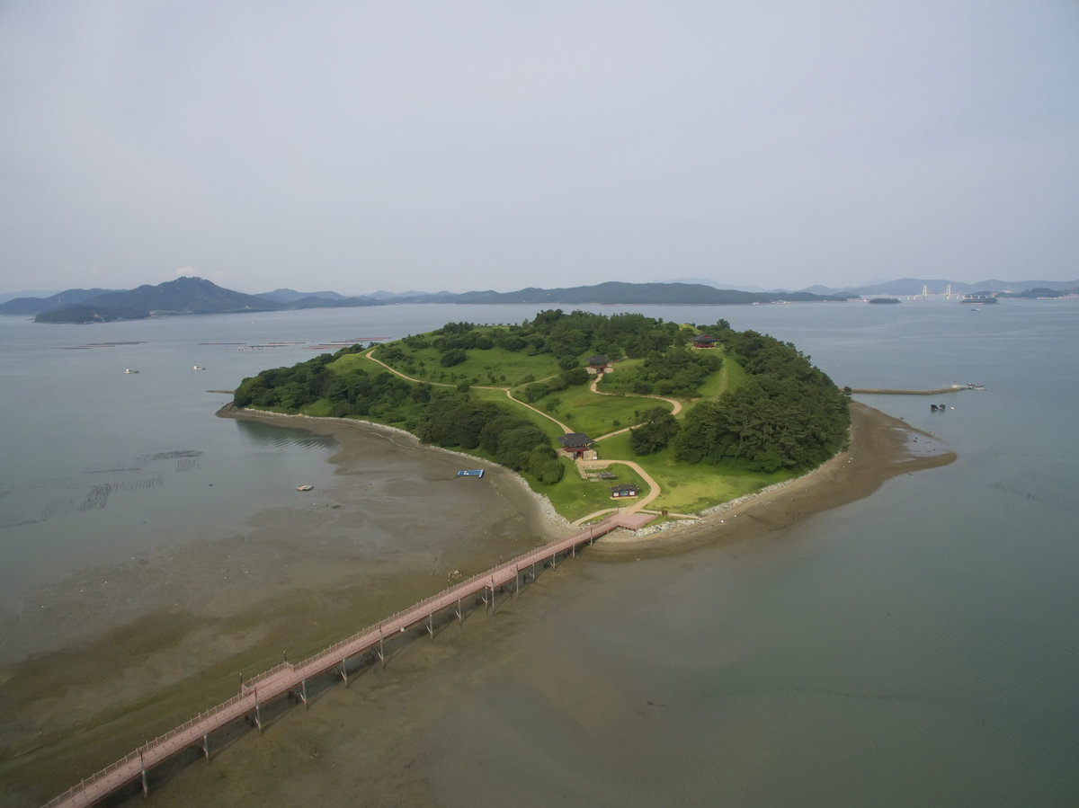 장도 일명 장군섬이라 불리는 곳으로 통일신라시대 장보고 대사가 설치한 청해진의 본진이 있었던 곳이다.